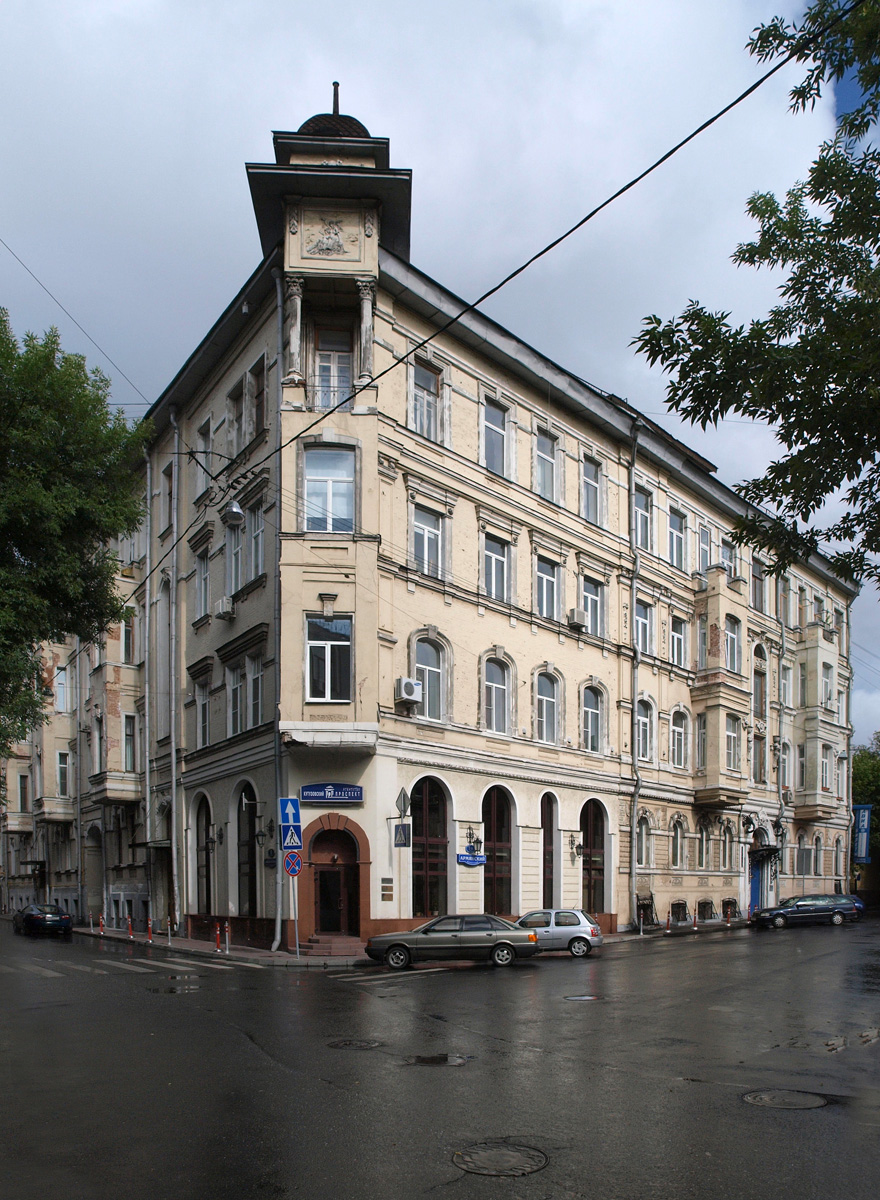 Corner of Armyansky (right) and Krivokolenny (left) Lanes, Moscow